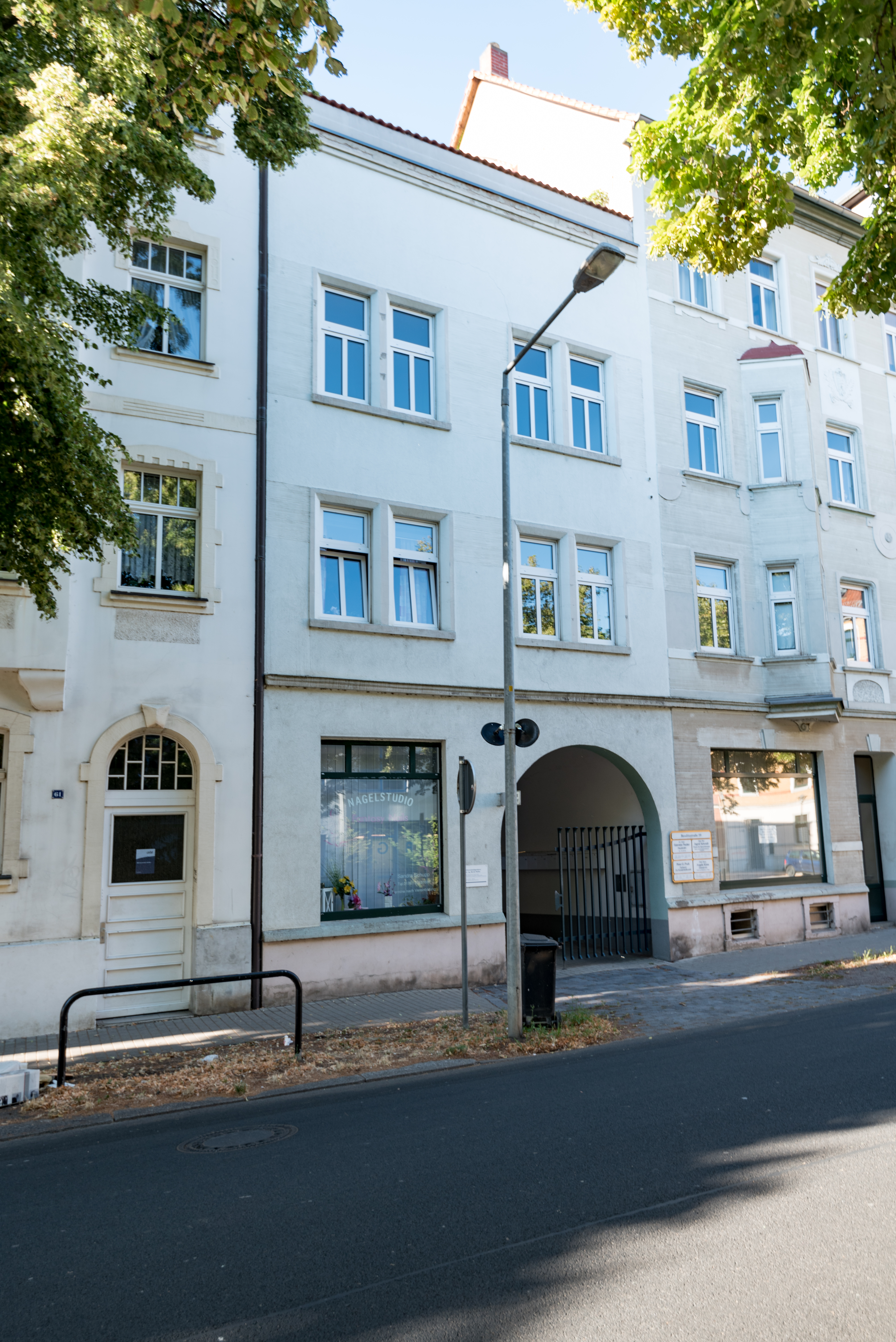 Weißenfels, Beuditzstraße 59